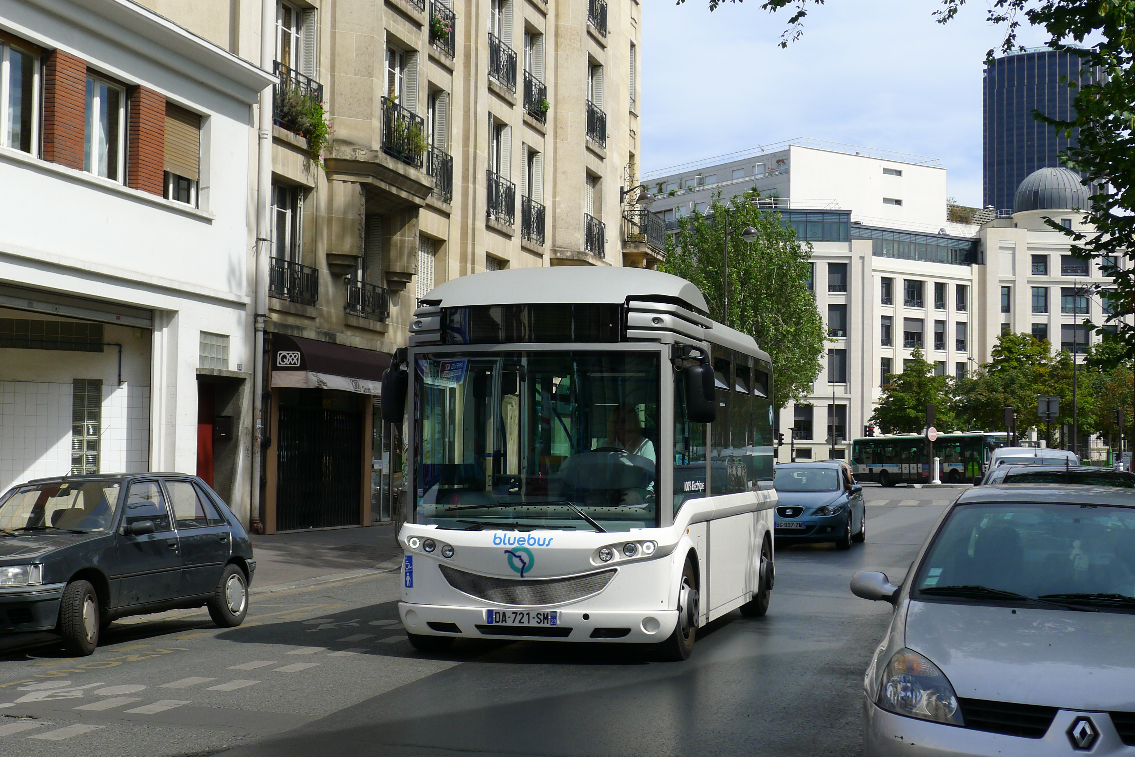 Bolloré BlueBus (électrique) no 71 de la RATP. Il circule sur la navette entre Ministère de la Santé et Montparnasse 2. Il est remisé au dépôt de Croix-Nivert.